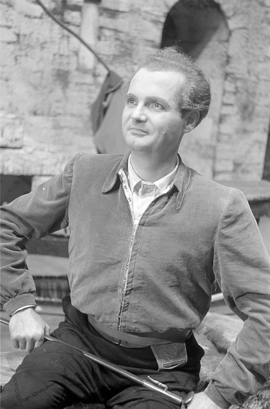 Original image description from the Deutsche Fotothek Szenenbilder mit Josef Burgwinkel in der Titelrolle, Tiana Lemnitz als Gilda, Carola Goerlich als Maddalena und Peter Anders als Graf von Mantua